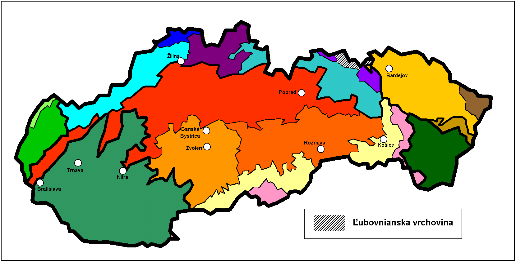 Lubovnianska_vrchovina